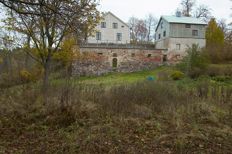 Byggnaden är ett uthus som står på resterna av det södra slottstornet, längst till höger, från 1820-1830. Motiv: Rönö kungsgård Nyckelord: Raä-Fastigheter Kategori: Kungsgård/kungsladugård Byggnaden är ett uthus som står på resterna av det södra slottstornet, längst till höger, från 1820-1830.